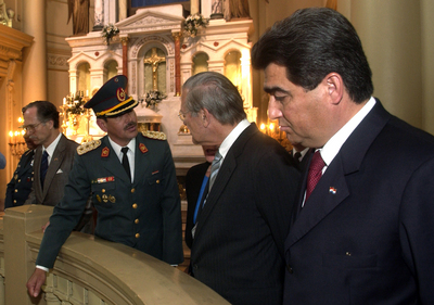 Donald Rumsfeld and Roberto Gonzalez.